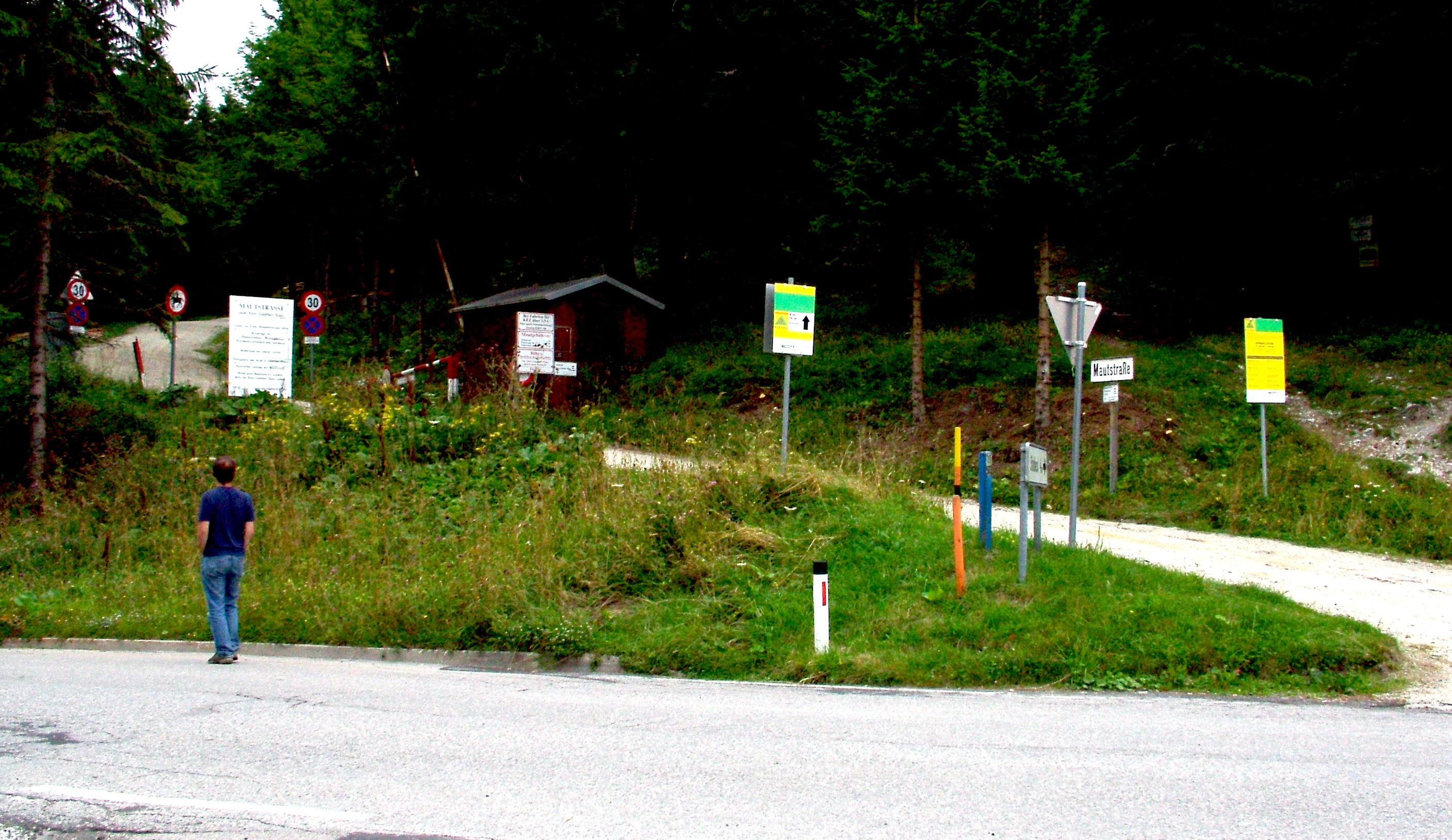 Pfaffen-hágó (Stájerország, Ausztria), mellékút a hágóról a Stuhleck felé